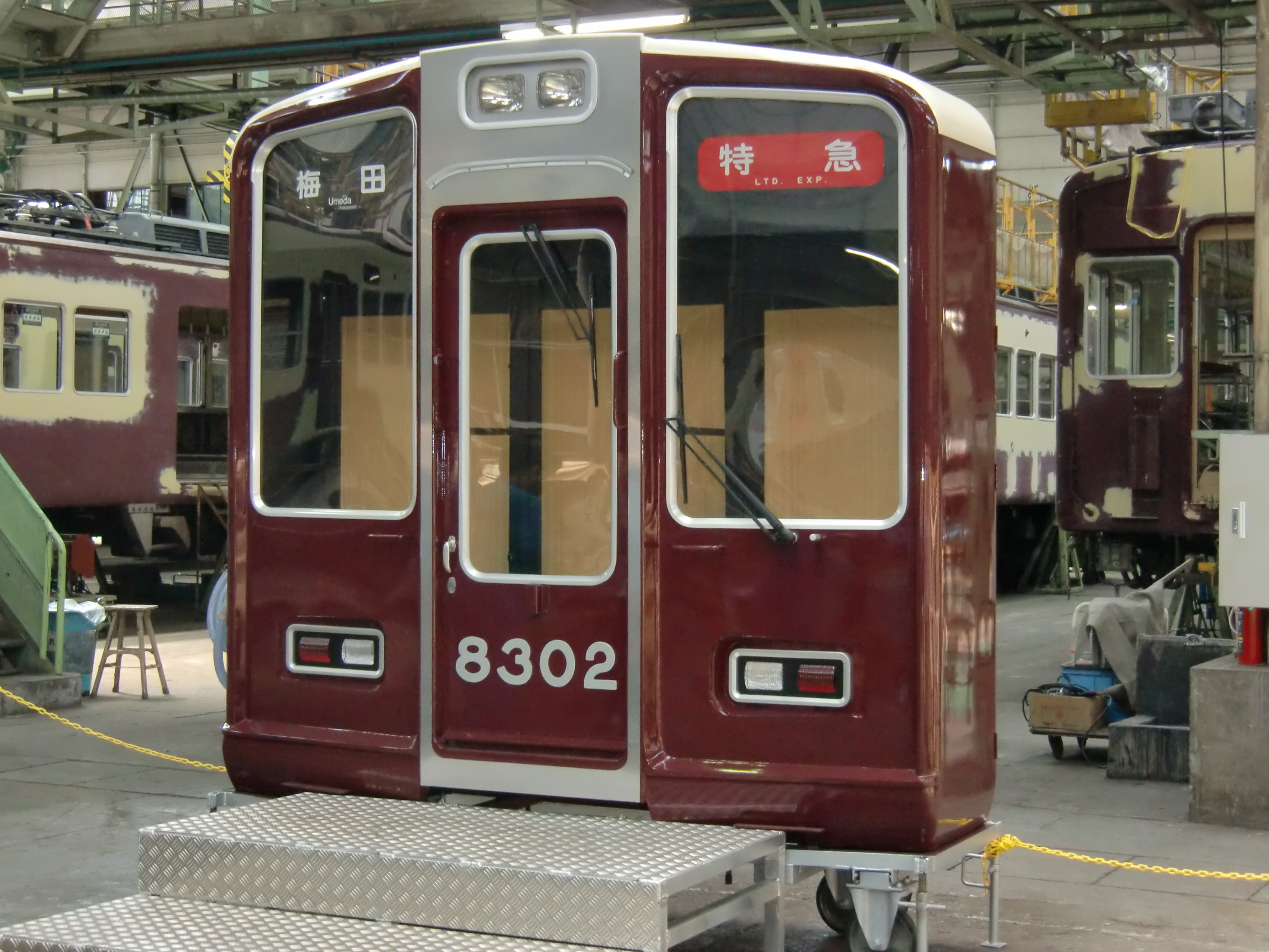 工場内公開時の記念撮影用に作られた8302の前頭部モックアップ。材料は木が主体だそうです 2011.5.8 正雀工場にて